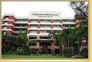 ตึกสิรินเทพ โรงเรียนพระหฤทัยคอนแวนต์